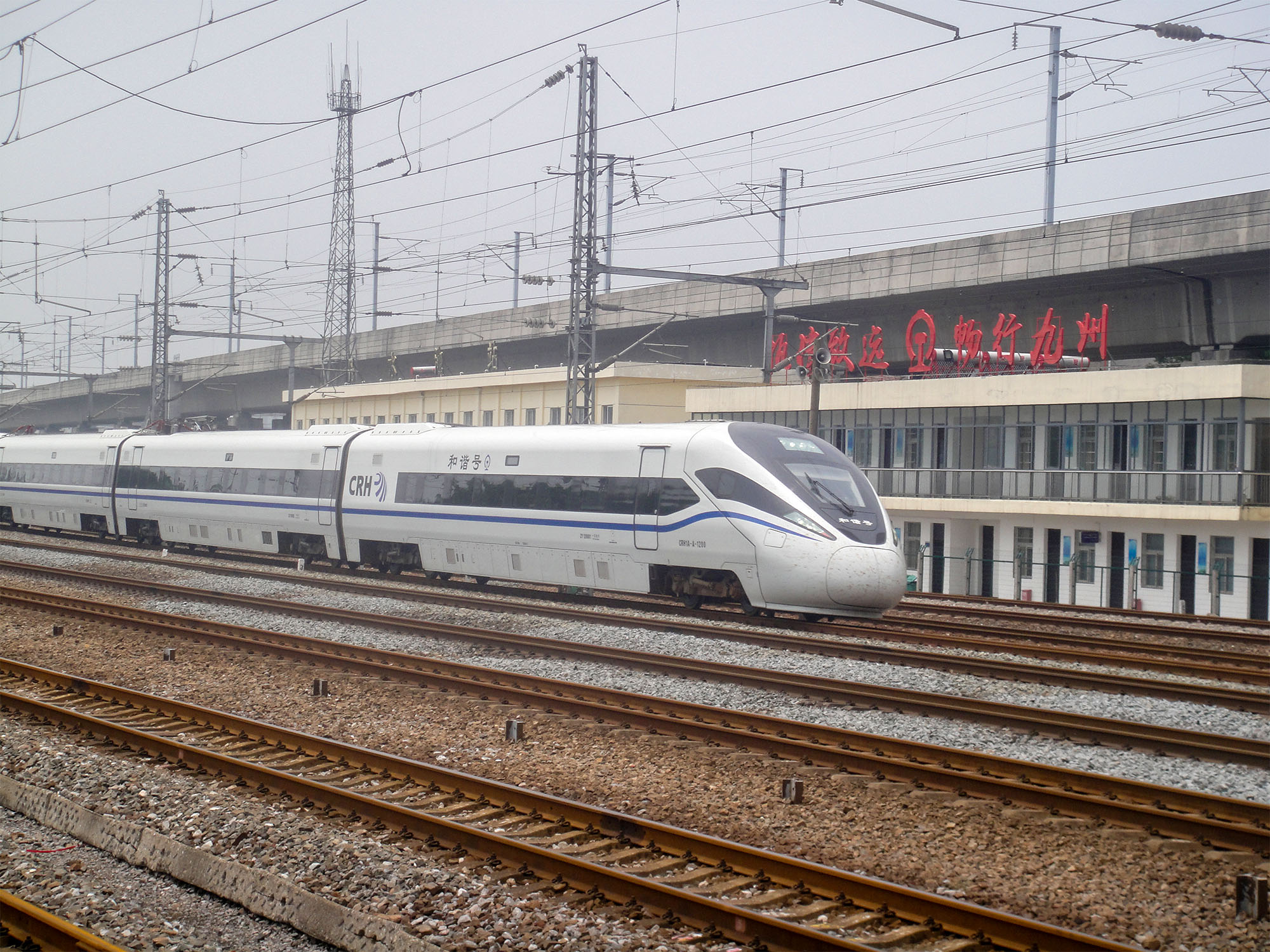 CRH1A-A 担当的 D296 次列车通过丹水池站